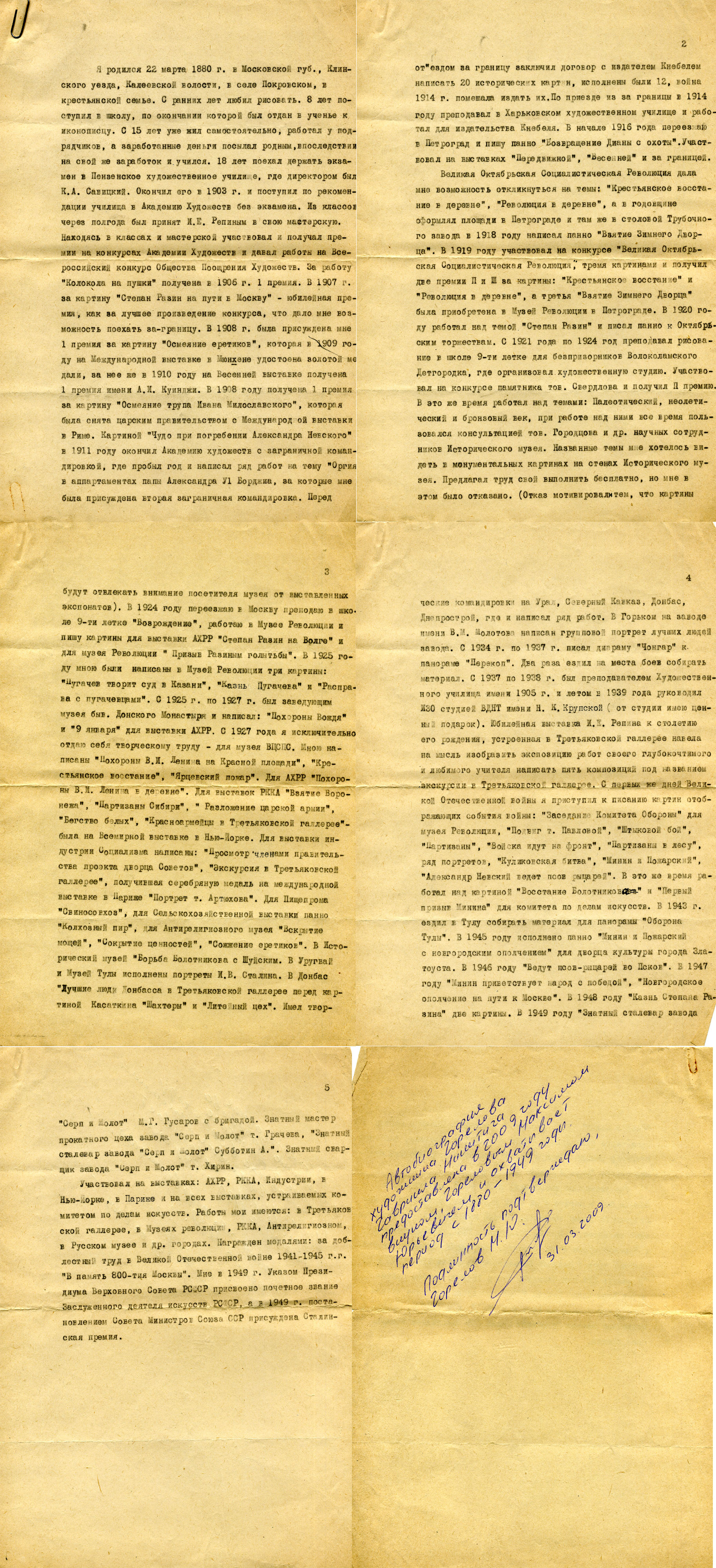 Автобиография (скан) художника Горелова Гавриила Никитича предоставленная его внуком, Гореловым Максимом Юрьевичем для свободного использования всеми желающими.